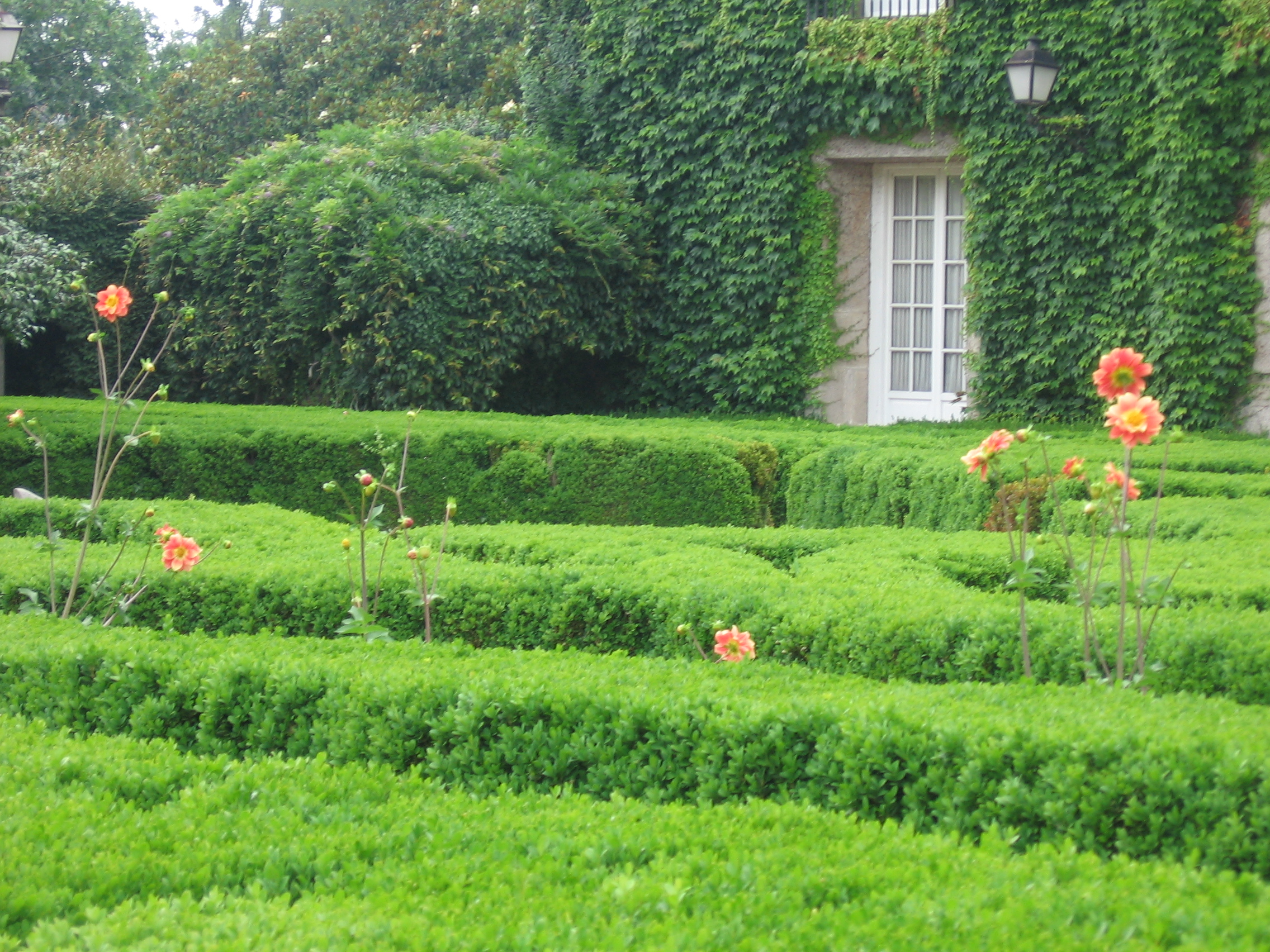 Dálias sobressaem de entre os buxos, Castrelos, Vigo